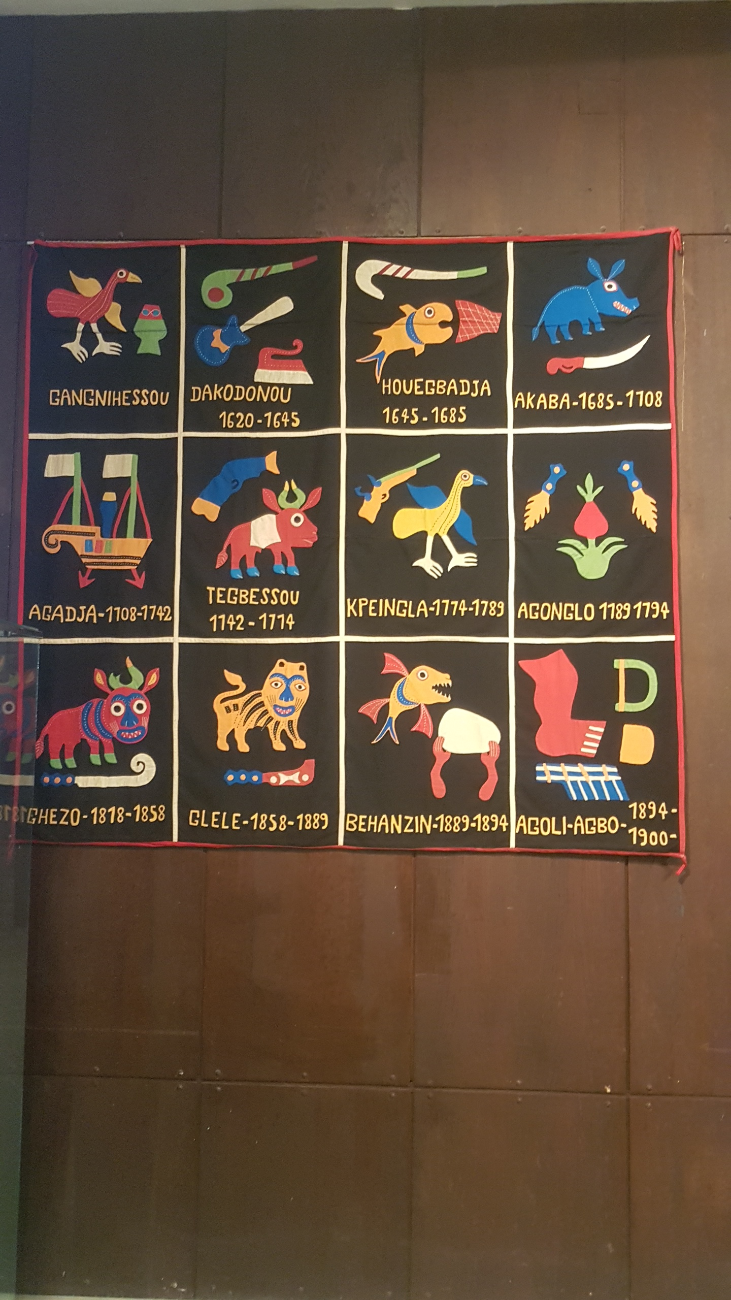 Српски (ћирилица): Дахомејска тканина - 12 дахомејских владара